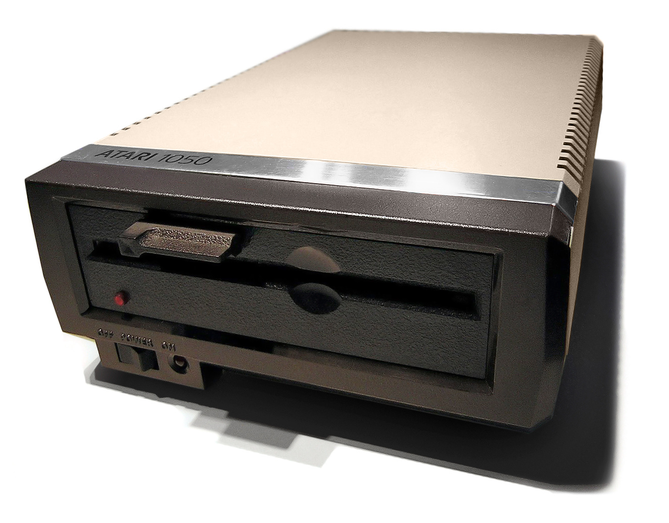 Atari 1050 5,25" Diskettenlaufwerk